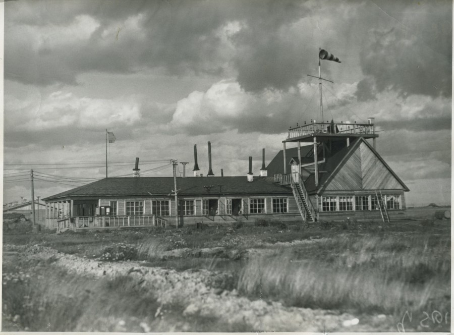 Аэровокзал аэропорта "Шоссейная" в 1933 году